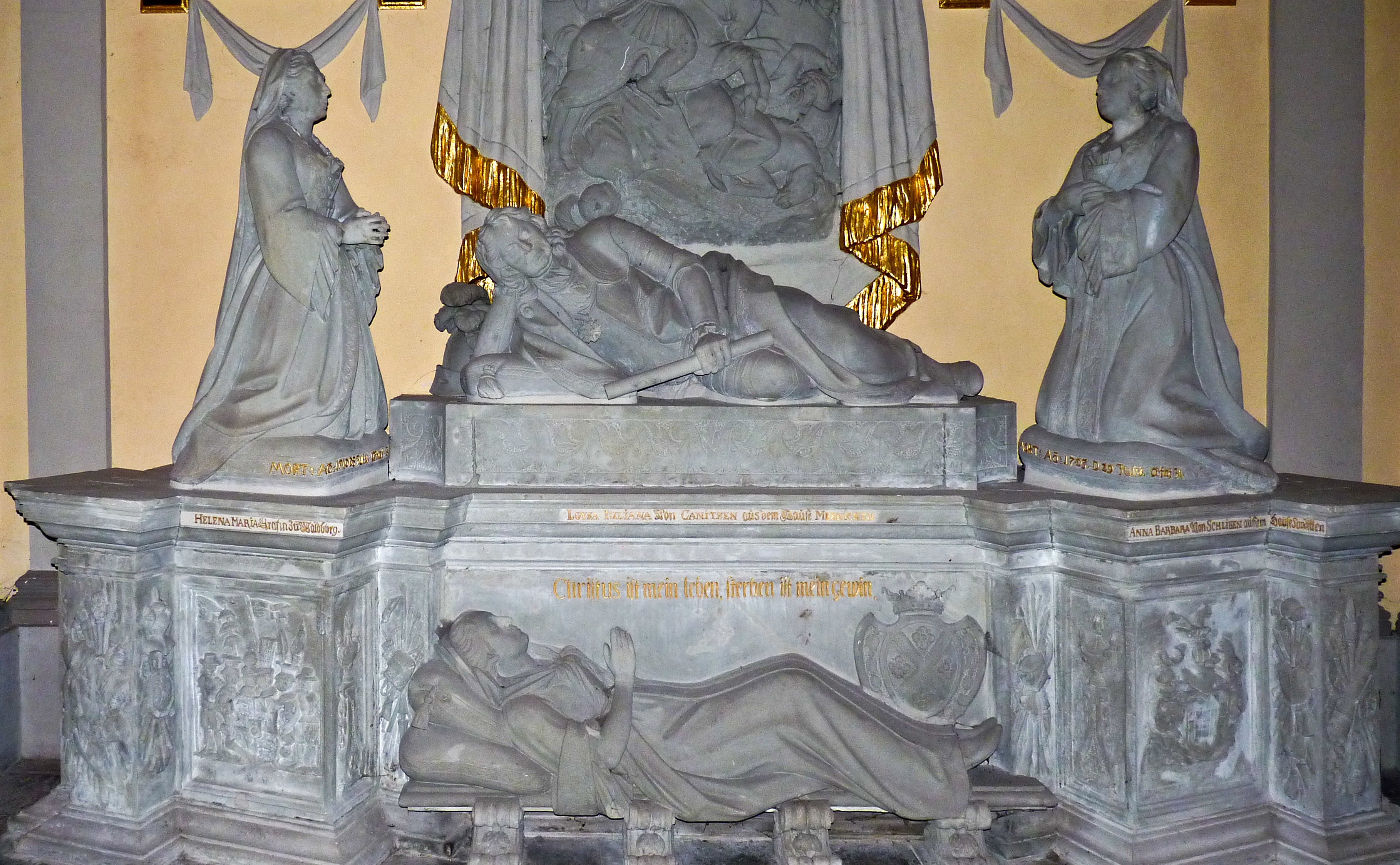 Grabmal von Otto Friedrich von der Groeben und seiner 3 hier mit ihm begrabenen Ehefrauen in seiner Grabkapelle im Dom von Marienwerder/Kwidzyn.